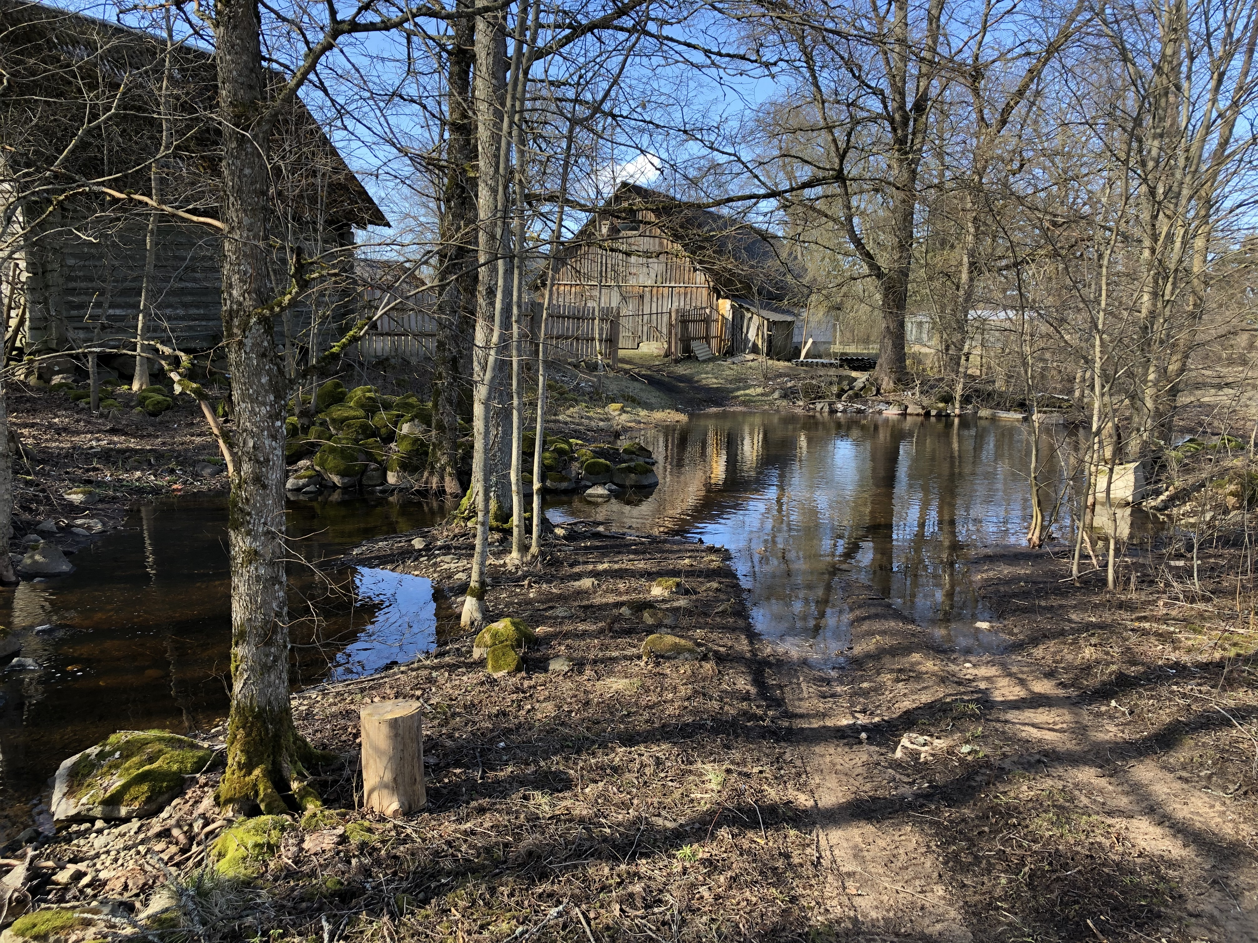 Kurisutes neeldub vesi maa alla, Kurevere